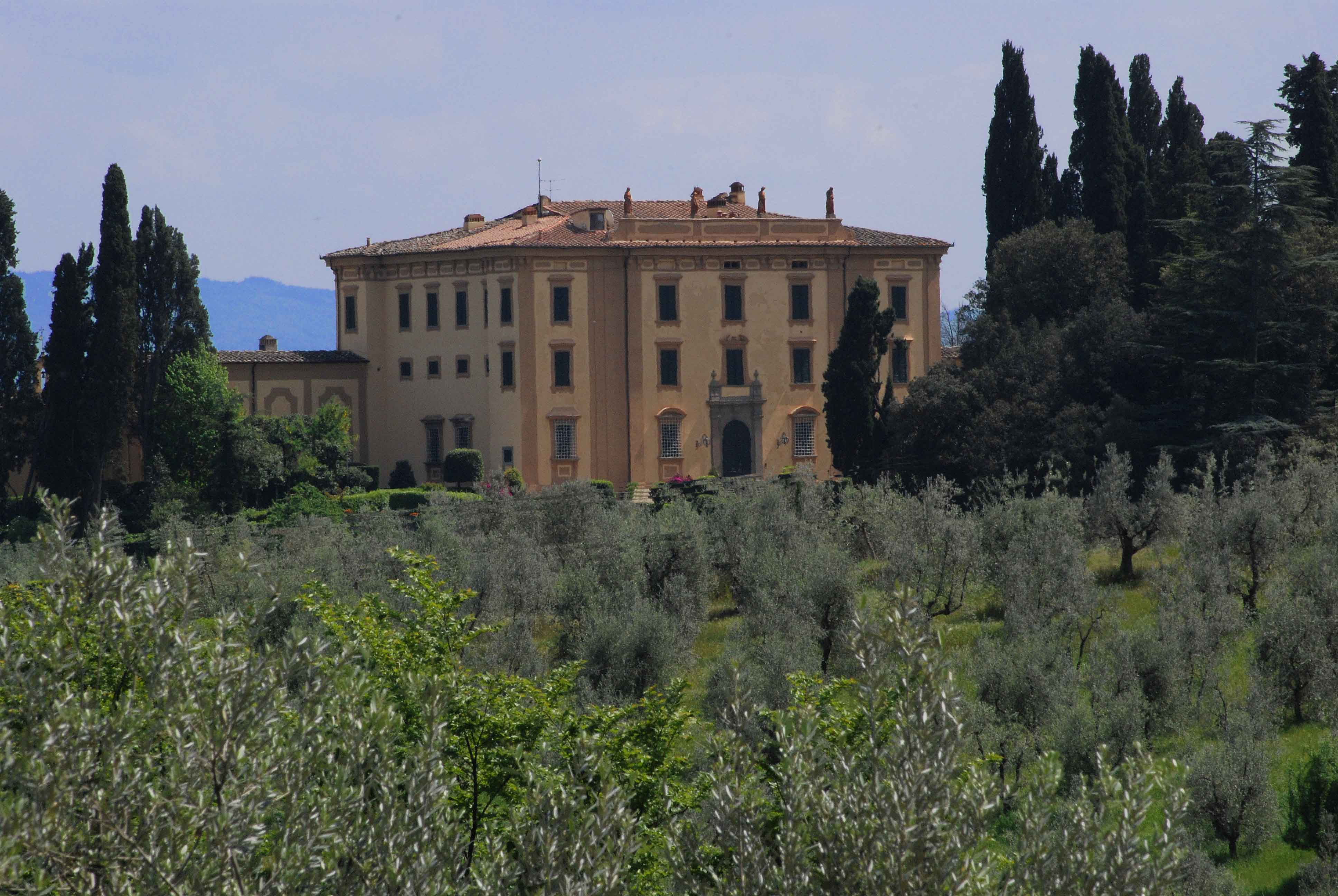 Villa Poggio ai Torselli (San Casciano Val Di Pesa)